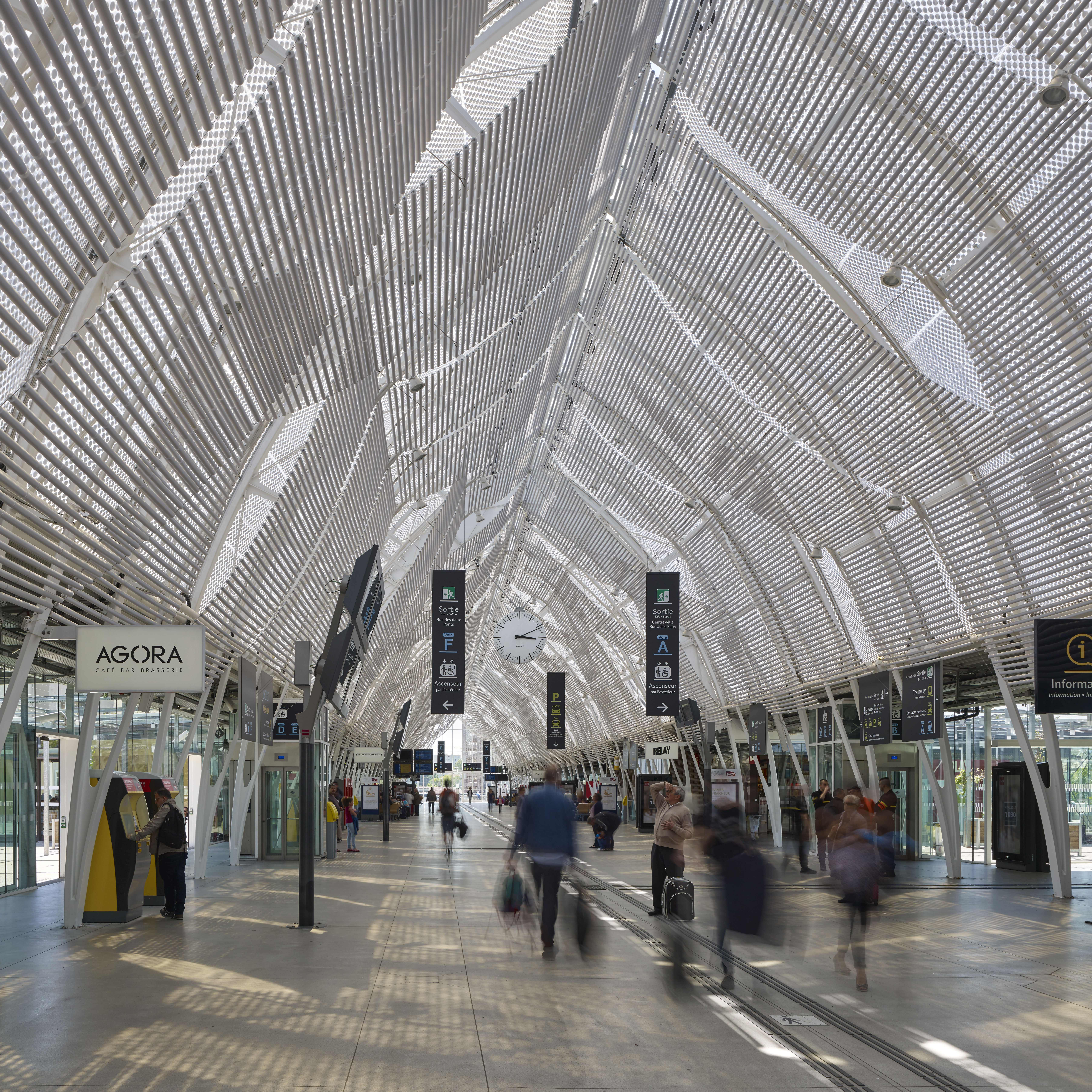 AREP / Photographe : Didier Boy de la Tour